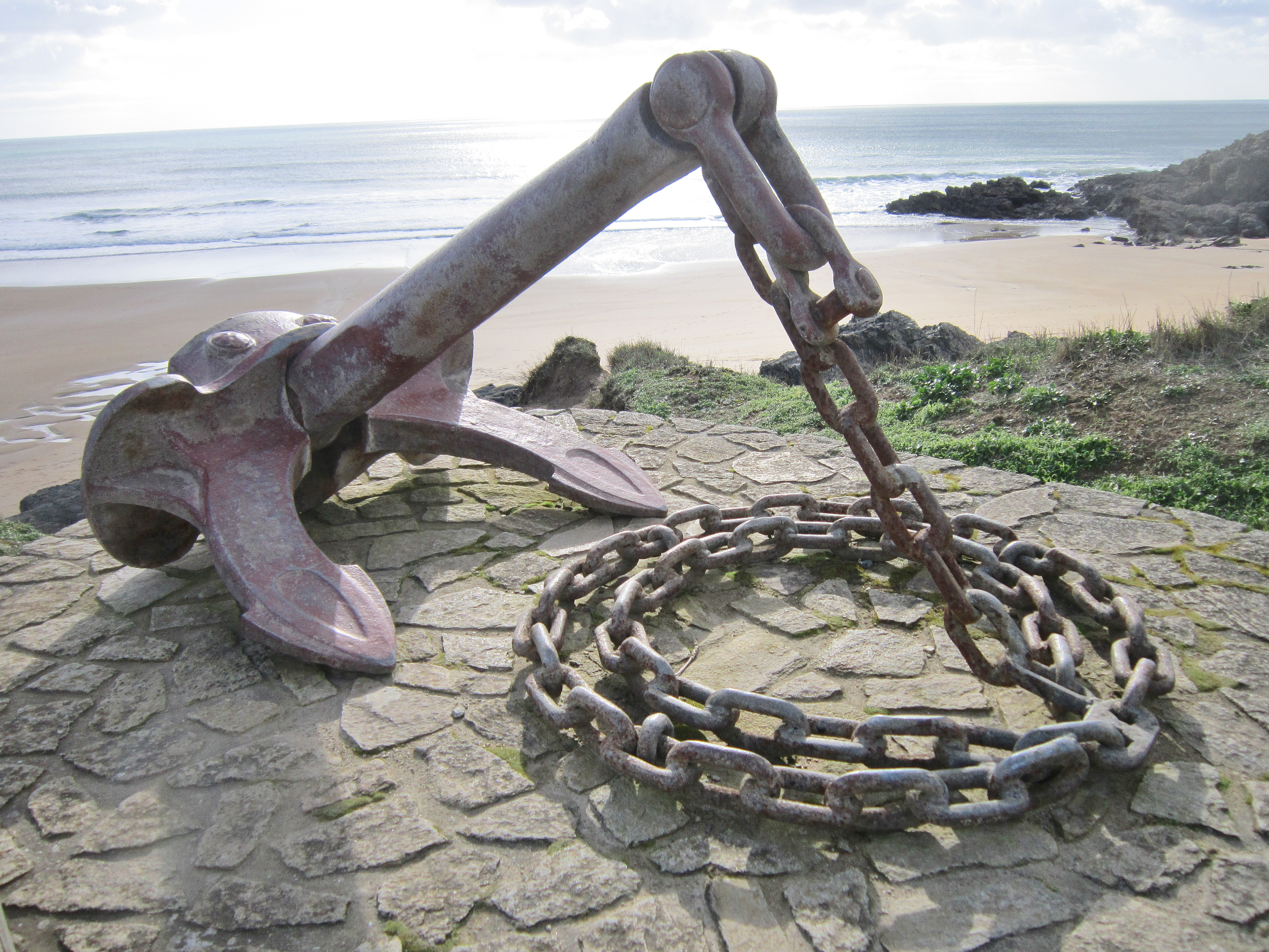 Le Pouldu : l'ancre du Julien Quéré (un chalutier qui, victime de la tempête et en feu alors qu'il revenait d'une campagne de pêche, s'échoua au pied de cette falaise dans la nuit du 20 au 21 janvier 1995).